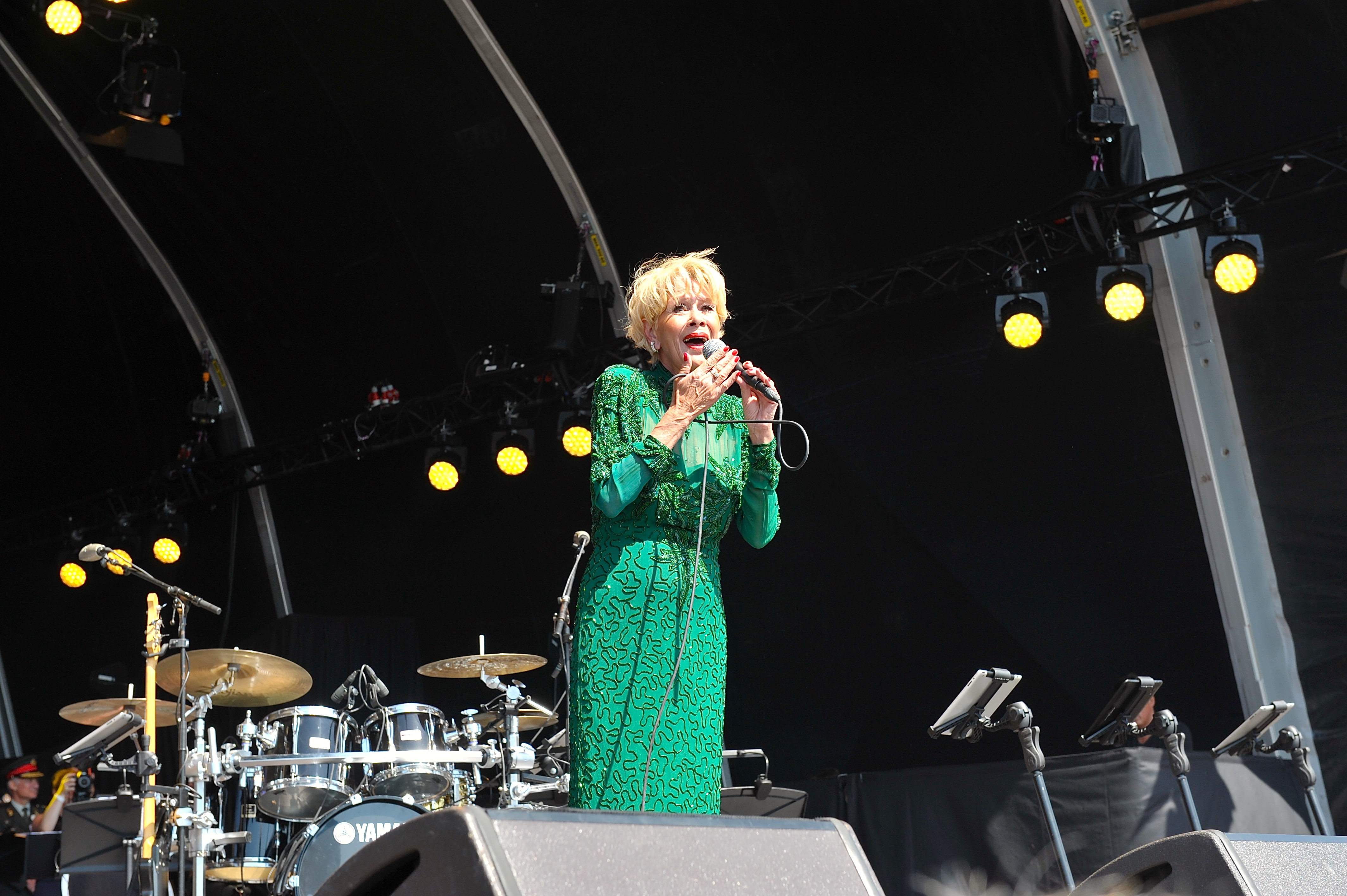 Anneke Gronloh (Celebes 1942) zingt 10 minuten (Brandend Zand, Soerabaya, Paradiso). Succes verzekerd, zeker bij het wat oudere publiek.